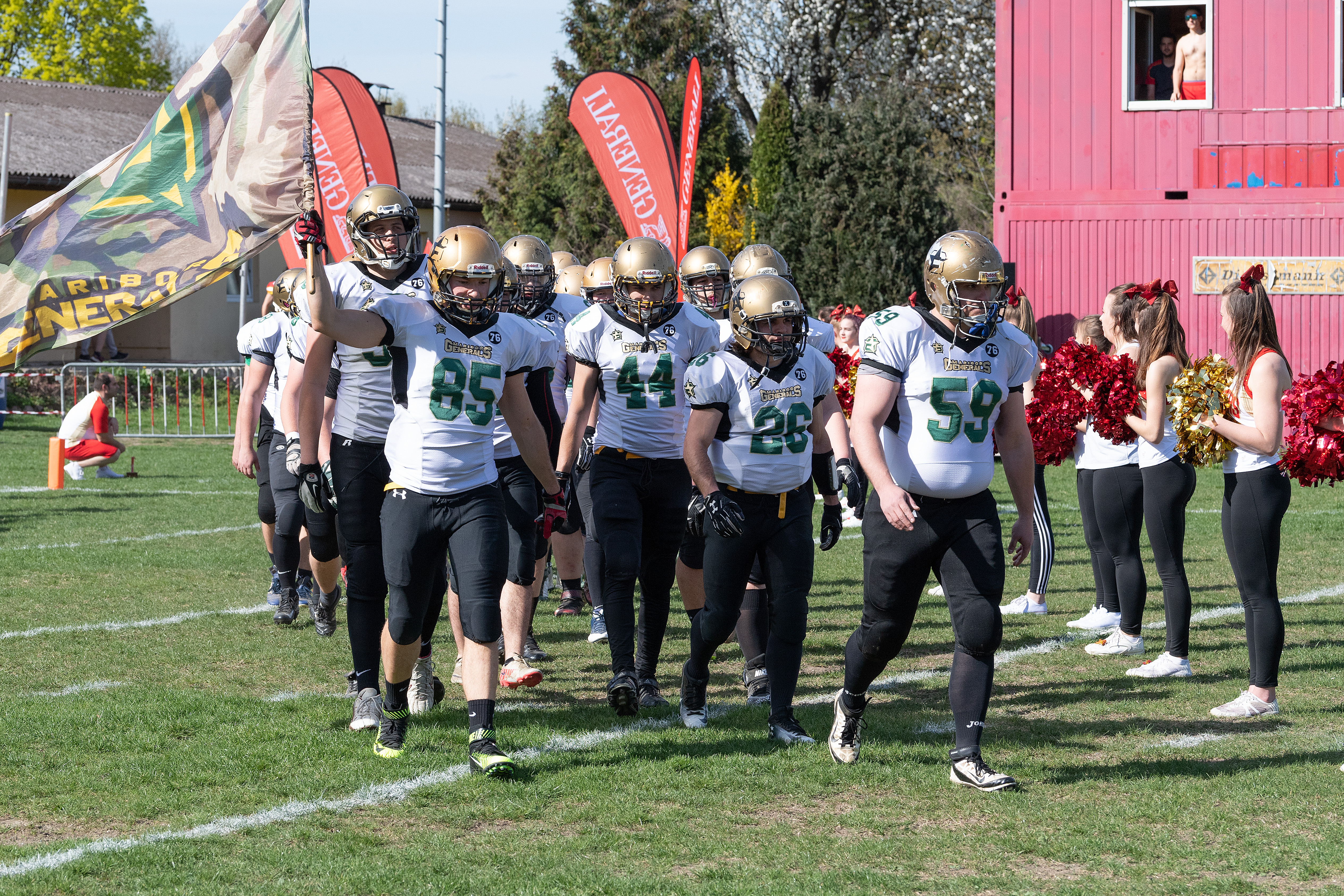 Heimspiel gegen die Maribor Generals - 34:00 Martin LUGER FOTOGRAF Schmiedgasse 2/5 A-3034 Maria Anzbach +43 699 10 10 91 54